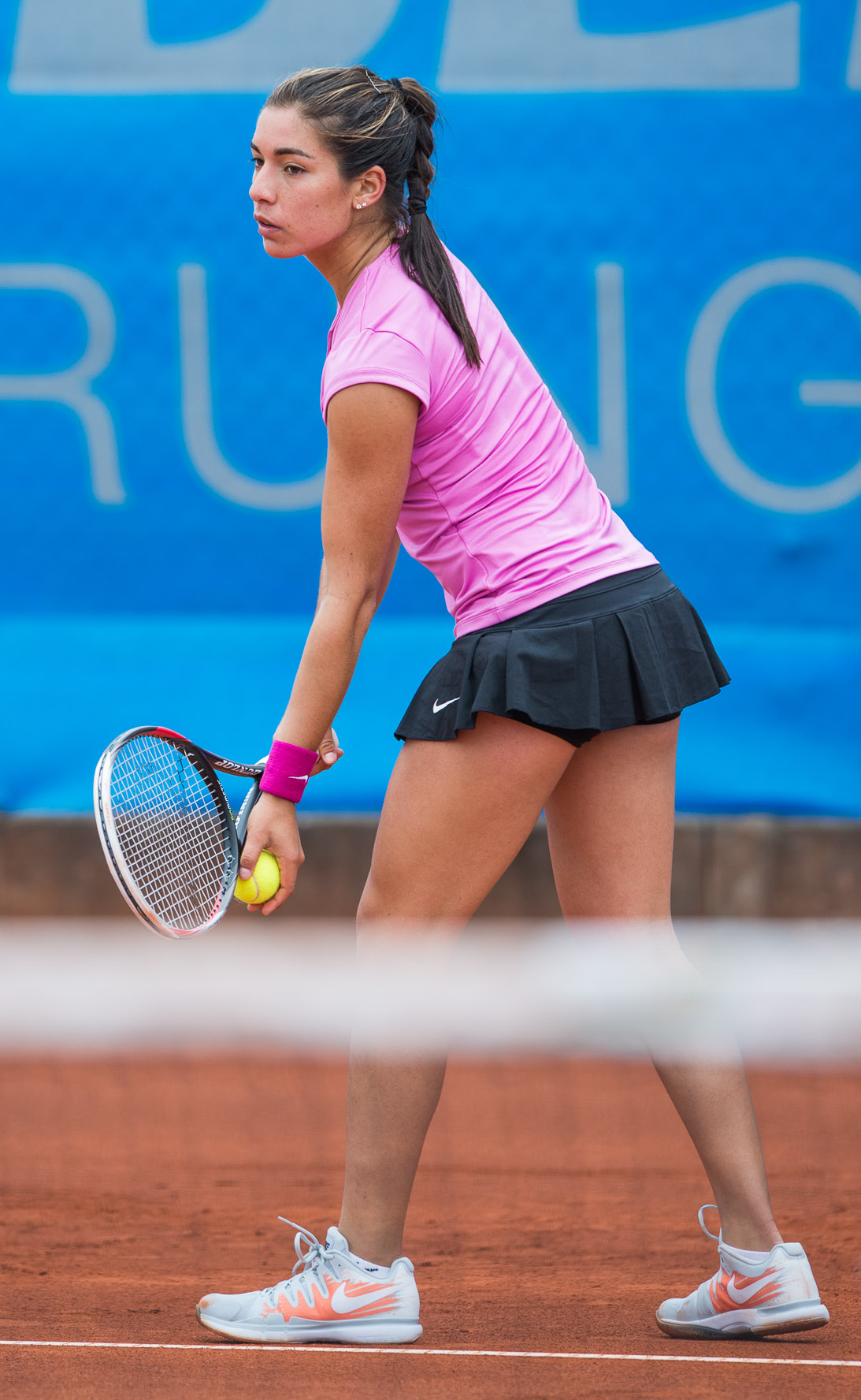 Damentennis,Montserrat Gonzalez,Montserrat González,Nürnberger Versicherungscup 2014,Tennis,WTA